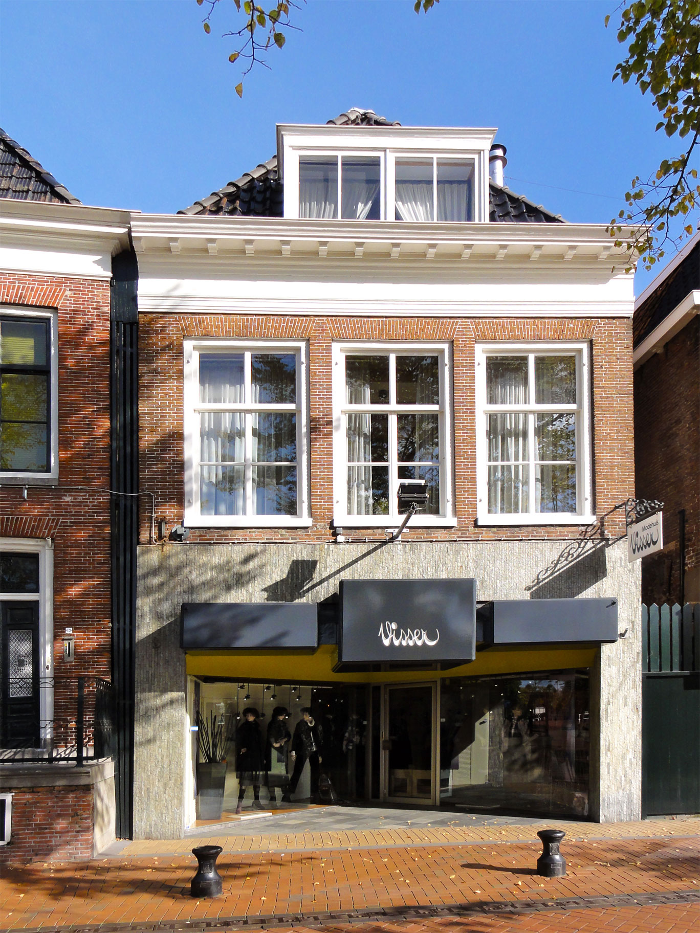 Diepswal 15 Dokkum, rijksmonument